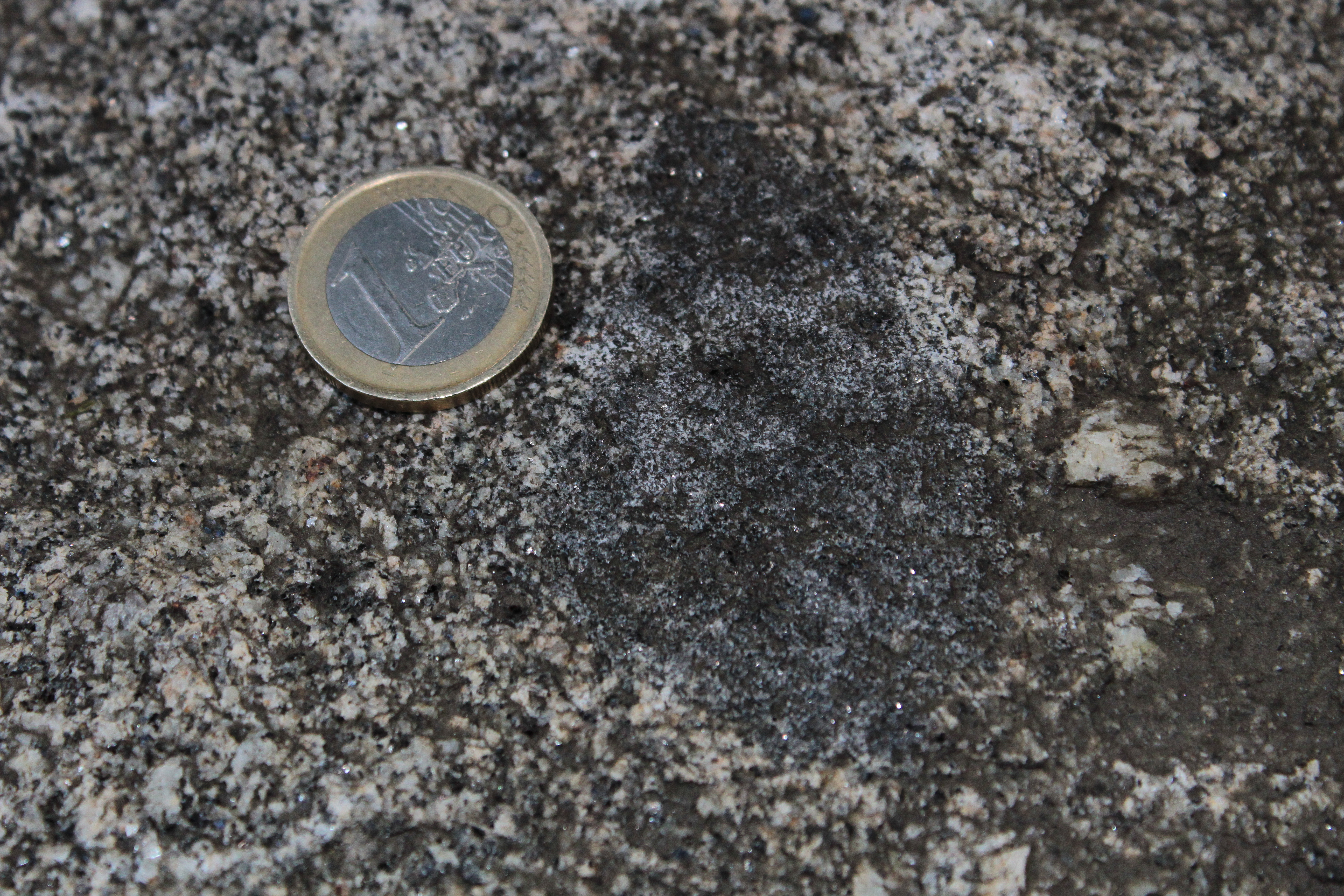 encrave microgranular mafico